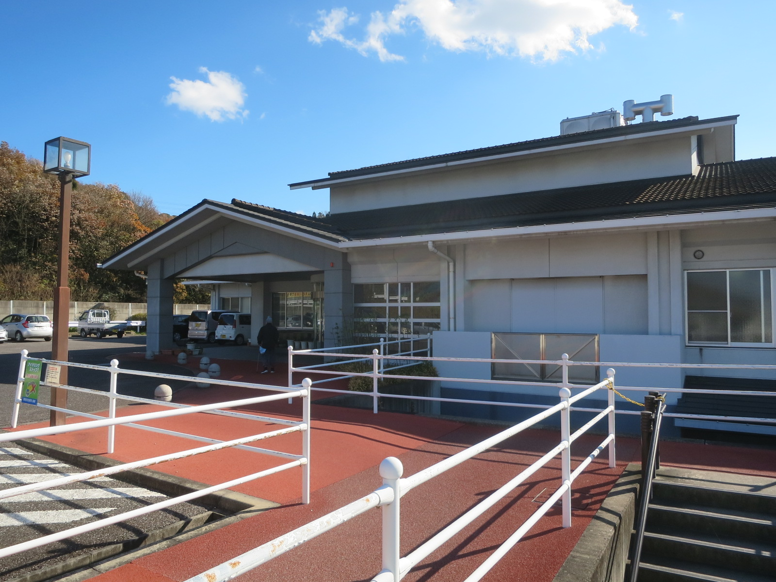 岡崎市北部地域福祉センター（岡崎市岩津町）